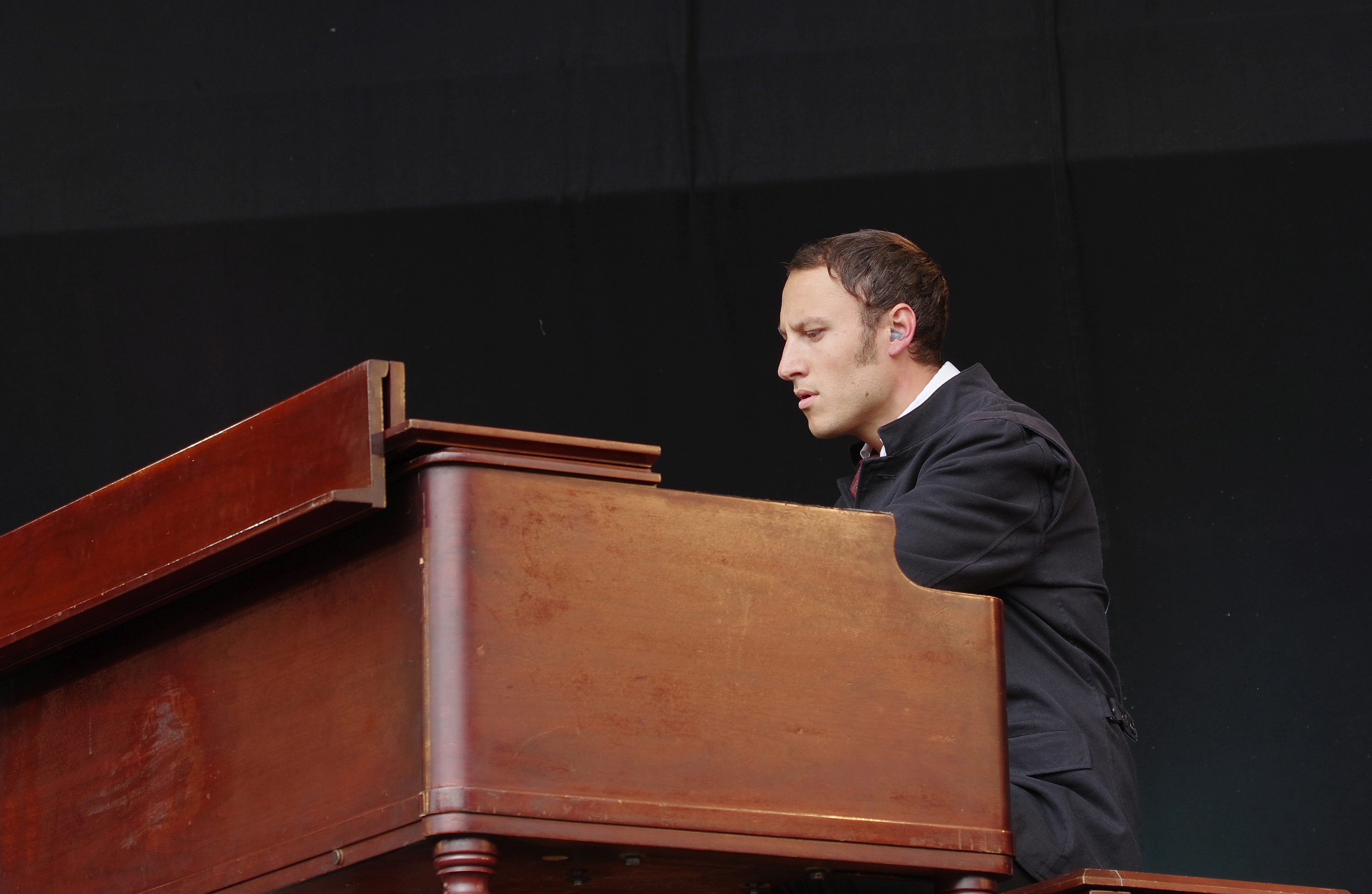 Anders Ljunggren, Organist des schwedischen Duos Trummor & Orgel beim Haldern Pop Festival 2013